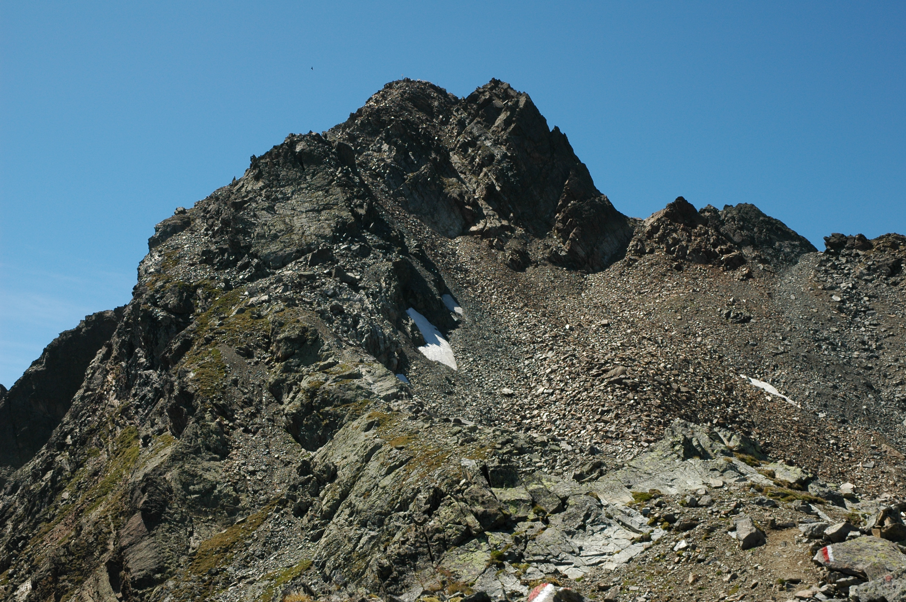 Wildgrat (2971m) in den Ötztaler Alpen: Anstieg von Osten (Erlanger Hütte)